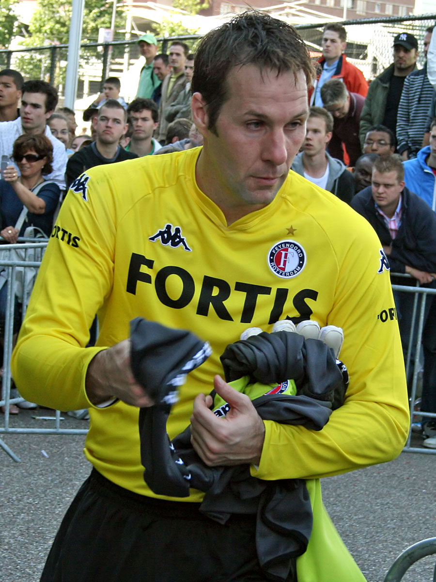 Henk Timmer (Feyenoord)